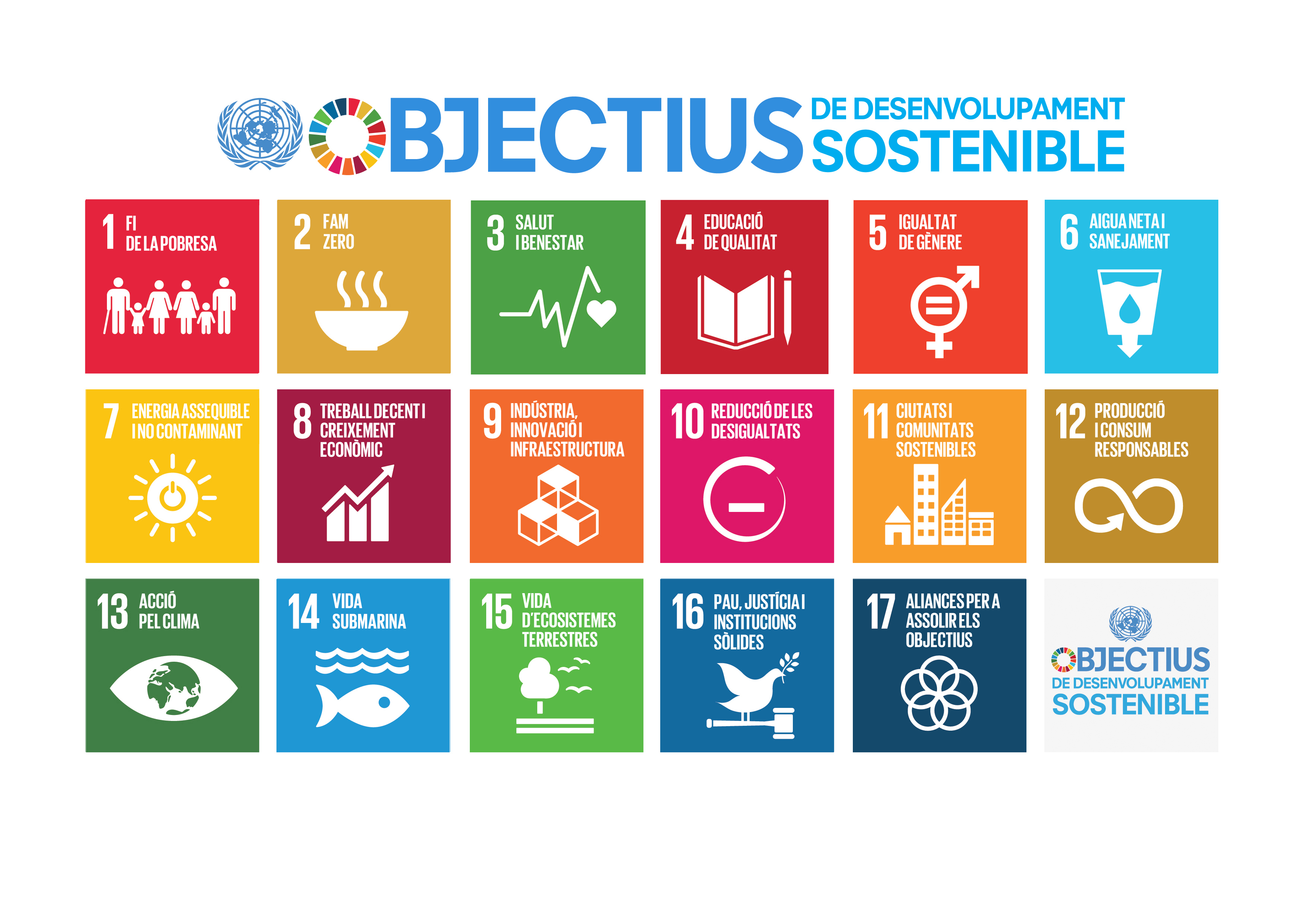 Cartell amb les icones dels 17 ODS traduïdes al català (Font: Respon.cat)